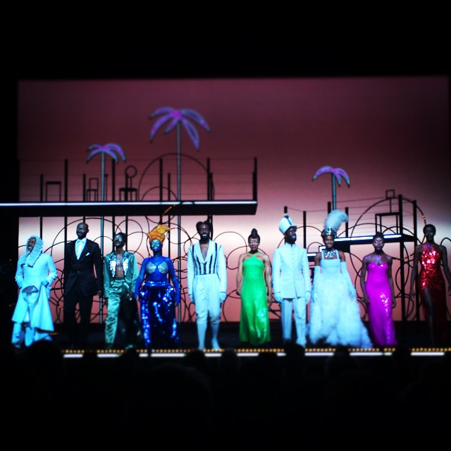 Les Nègres de Jean Genet par Bob Wilson au Théâtre de l'Odéon